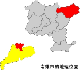 内容介绍：南雄市在韶关地图上的标示 原创者：zhuwq 创作日期：2005年1月 创作方法：将广东地图用扫描仪输入电脑，再将图片导入FLASH，用画笔描出轮廓，着填充，删除原图片，导出JPG图象便大工告成，这样制作的优点是，开始辛苦了点，但绘制别的县市便替换颜色即可。